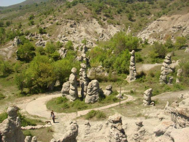 Kamienne Lalki